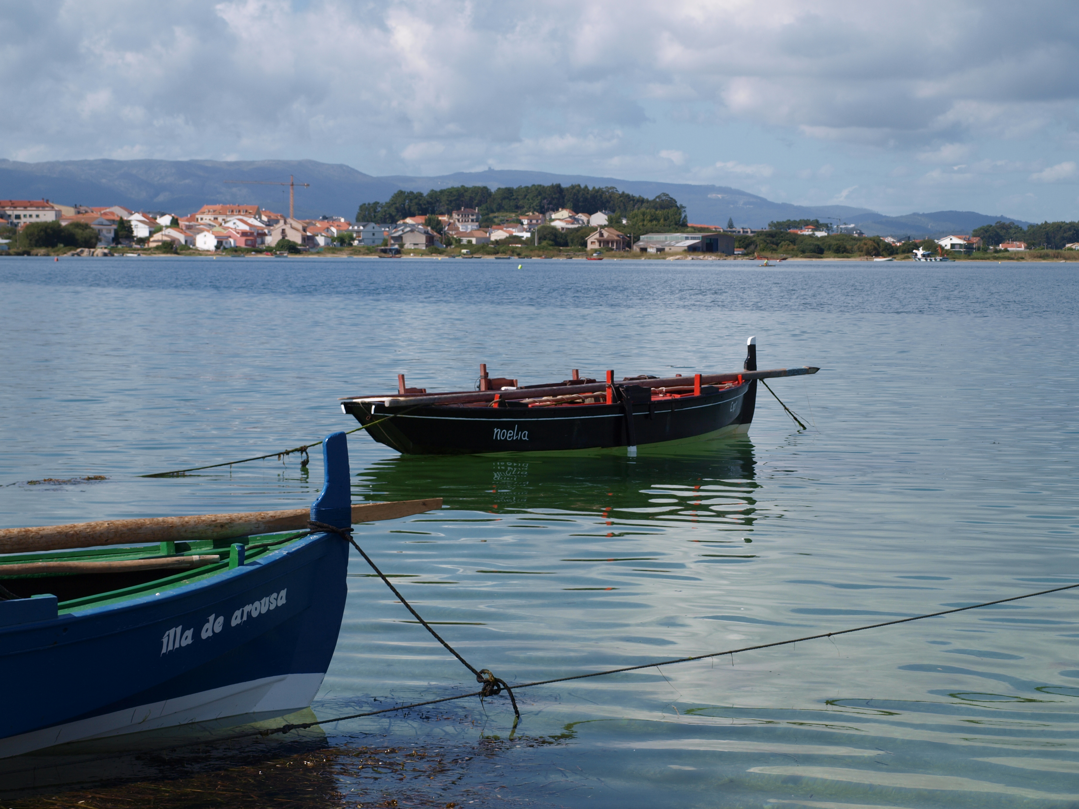 Dorna Noelia na ría de Arousa, unha tarde de Agosto.